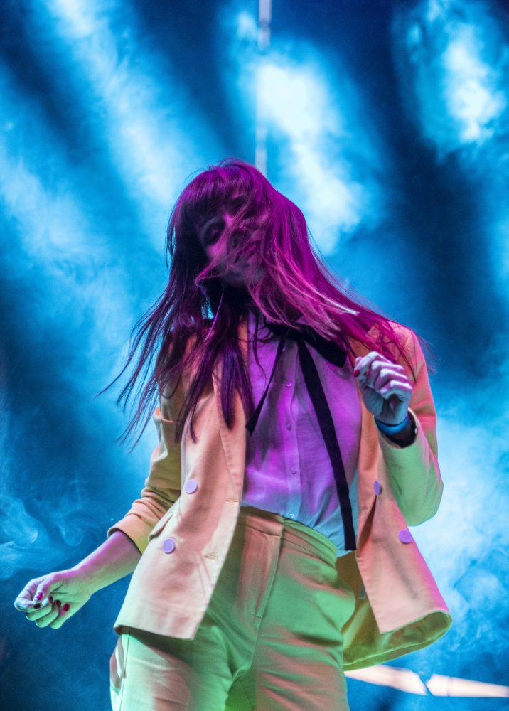 La música volvió a ser la protagonista ayer martes, 14 de mayo, de la programación de San Isidro, con propuestas de los más variados estilos, desde el proyecto Belenciana, que puso a bailar a varias generaciones en La Pradera, a la gran dama del indie español, La Bienquerida, que mostró su último trabajo, Fuego, en este mismo escenario, o al concierto de Anni B Sweet, que volvió a brillar con luz propia dentro de universo pop, en la Plaza Mayor. Y en la Plaza de Oriente un espectáculo sobre la naturaleza submarina.